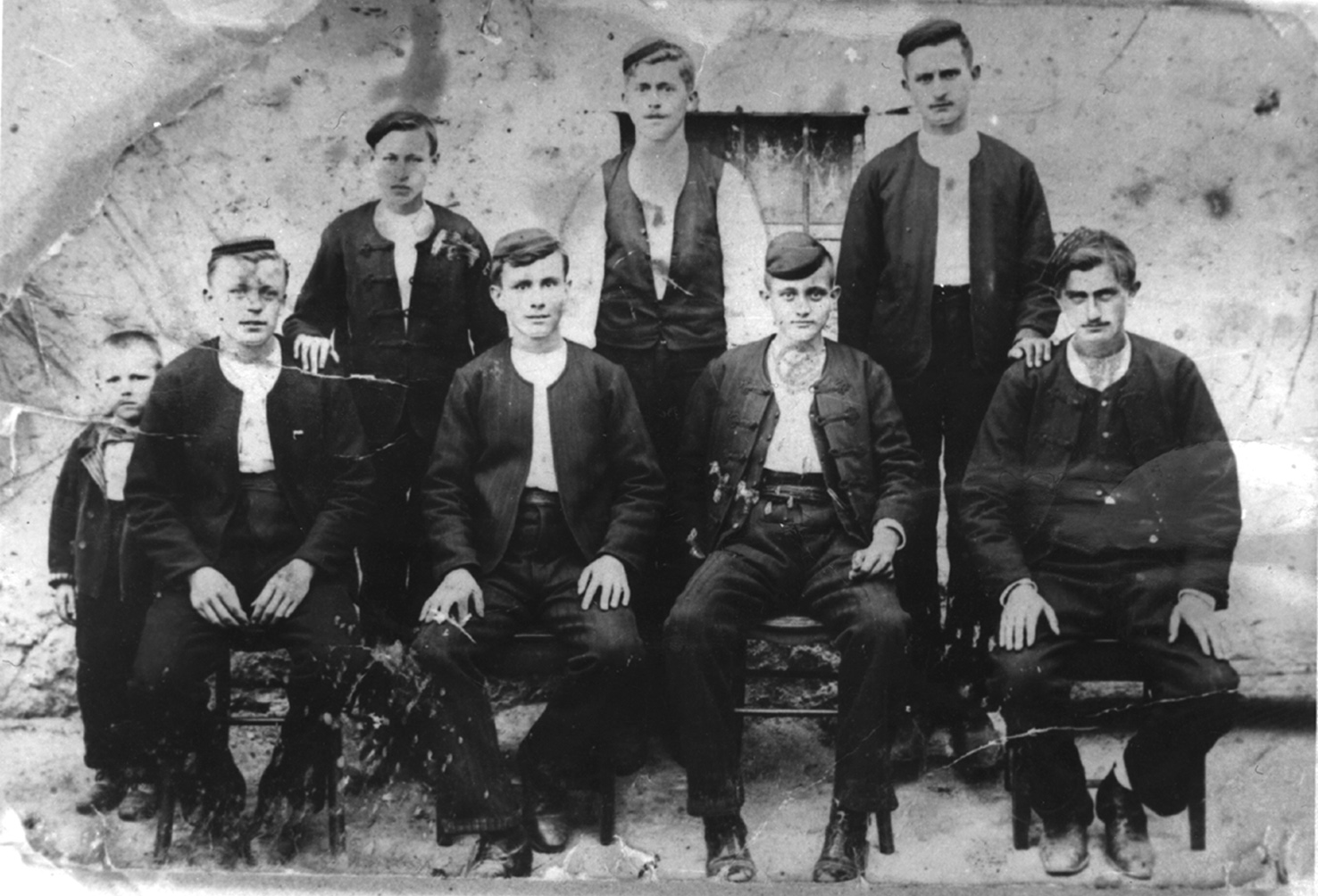 Različiti krojevi i pojedinosti veštita popularnog u Dalmaciji, fotografija iz Murtera s početka XX. stoljeća.